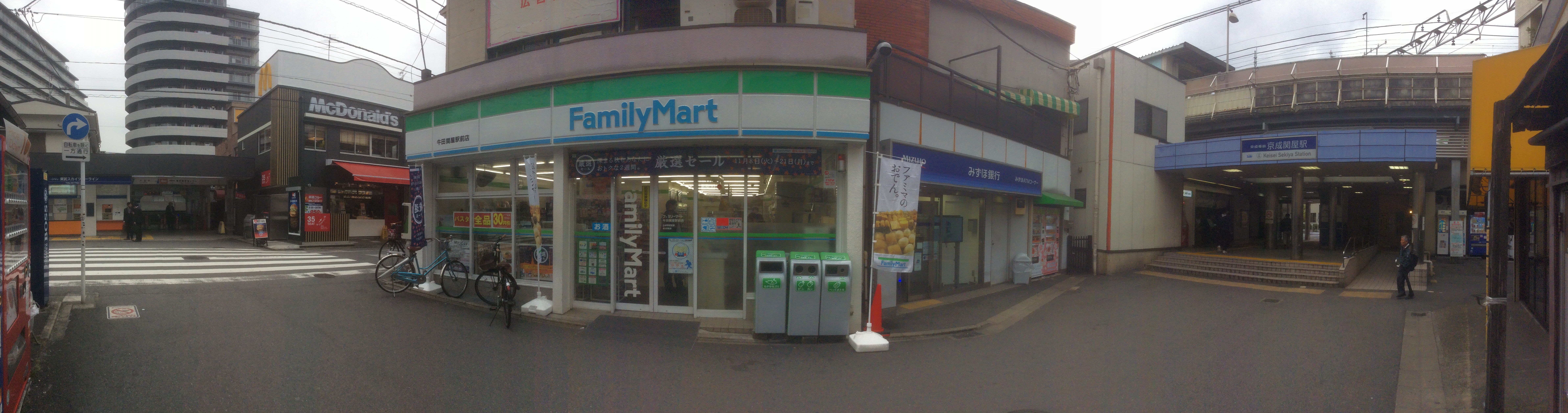 Gap between Keisei Sekiya and Ushida stations